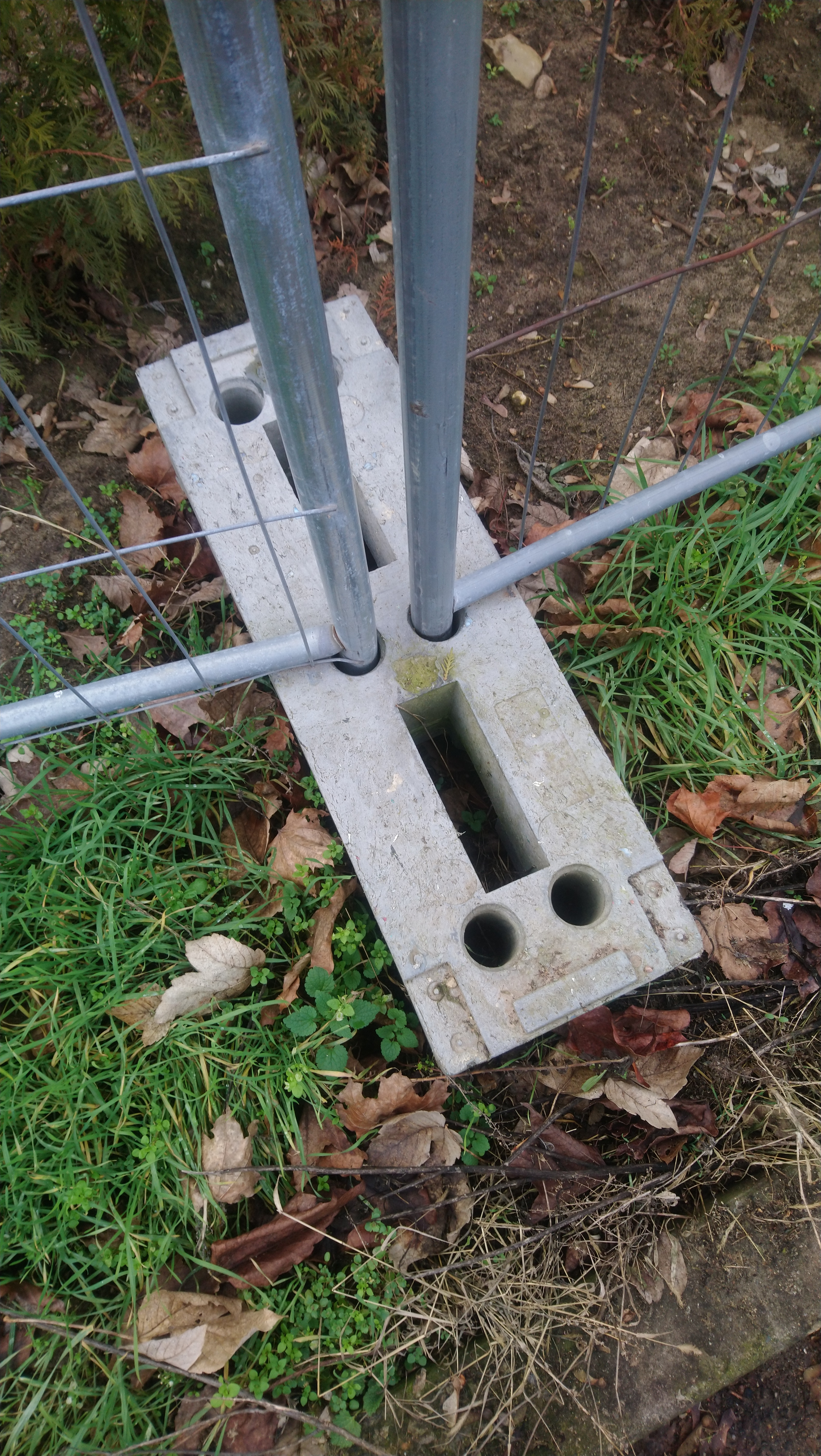 Als Bauzaunfuß wird ein Ständerfuß für Bauzäune mit einer bzw. mehreren nach oben offenen Aussparungen zum Einsetzen einer oder mehrerer Pfostenstangen genannt.